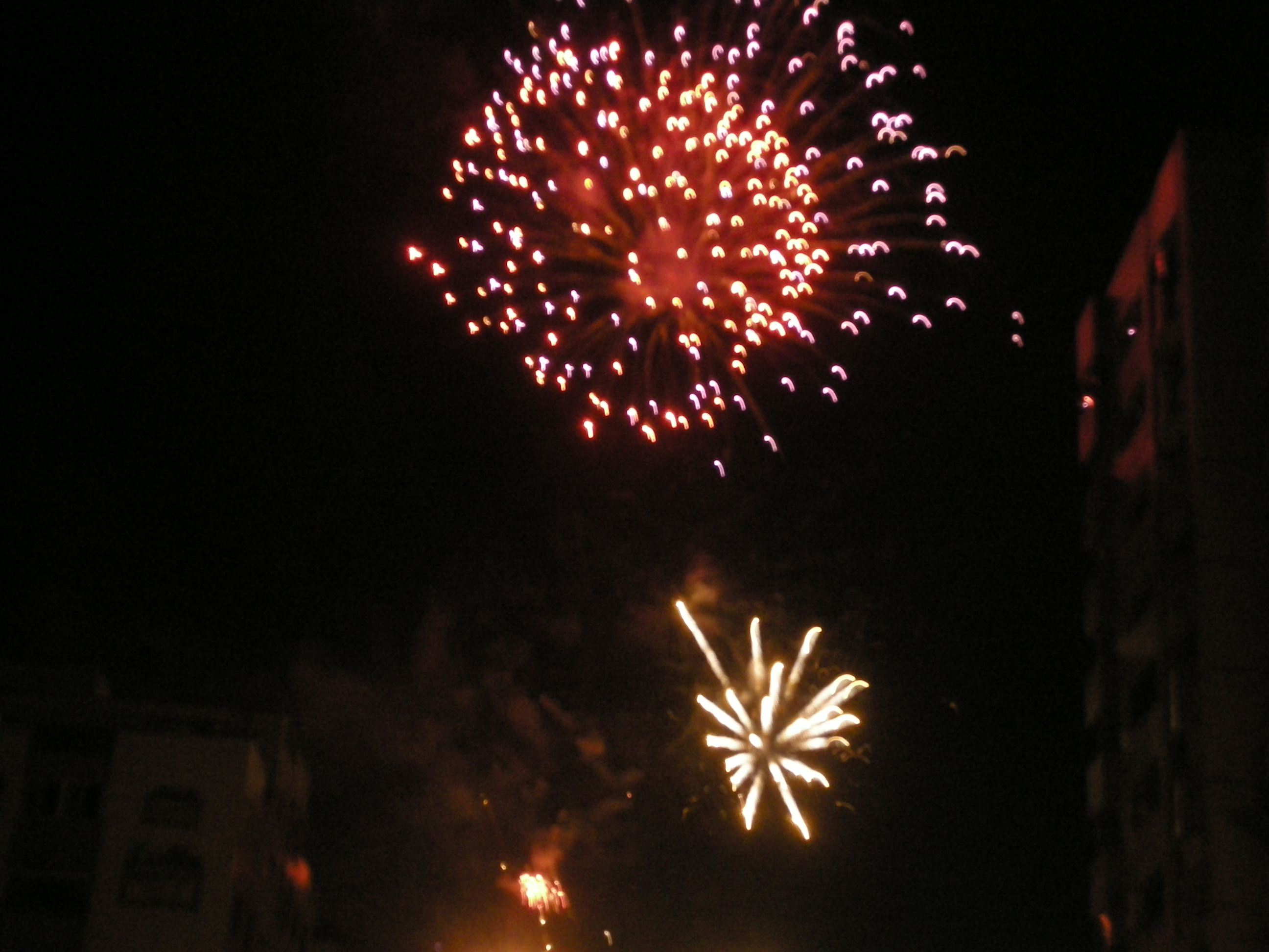 2008年1月1日天母煙火秀